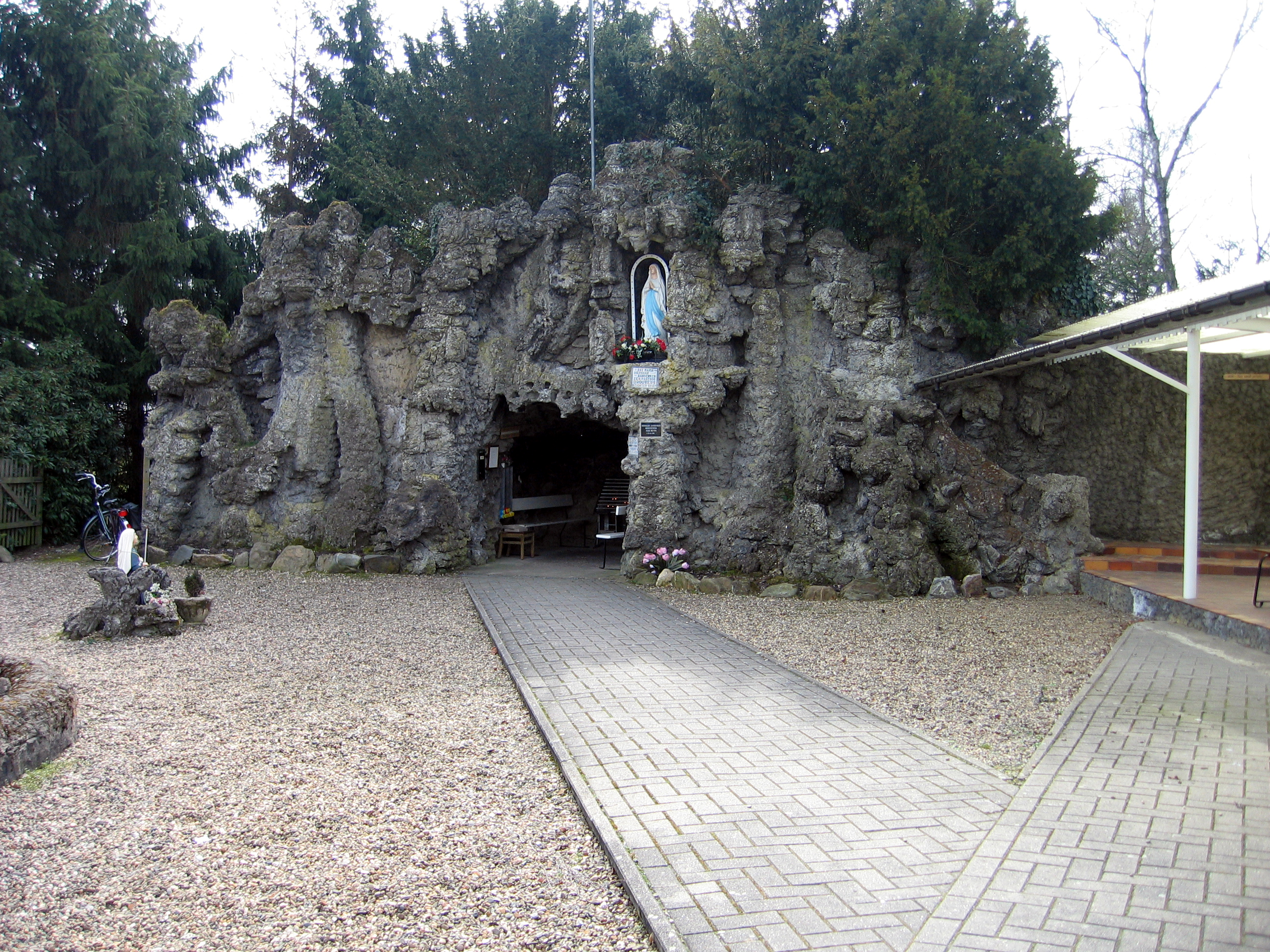 De grot, zeer gekend bedevaardsoord in Neeroeteren